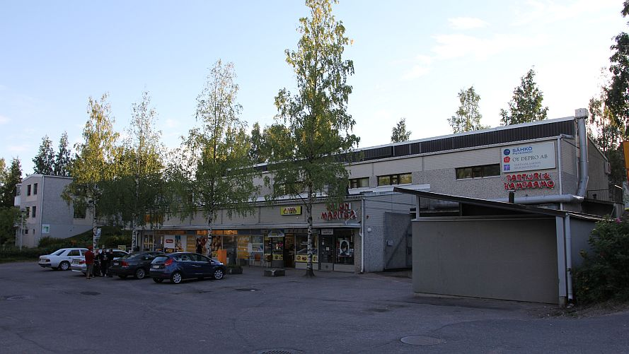 Vantaanlaakson ostoskeskus Vantaalla. Huom: Muista säilyttää viittaus kuvaajaan, mikäli käytät kuvaa.